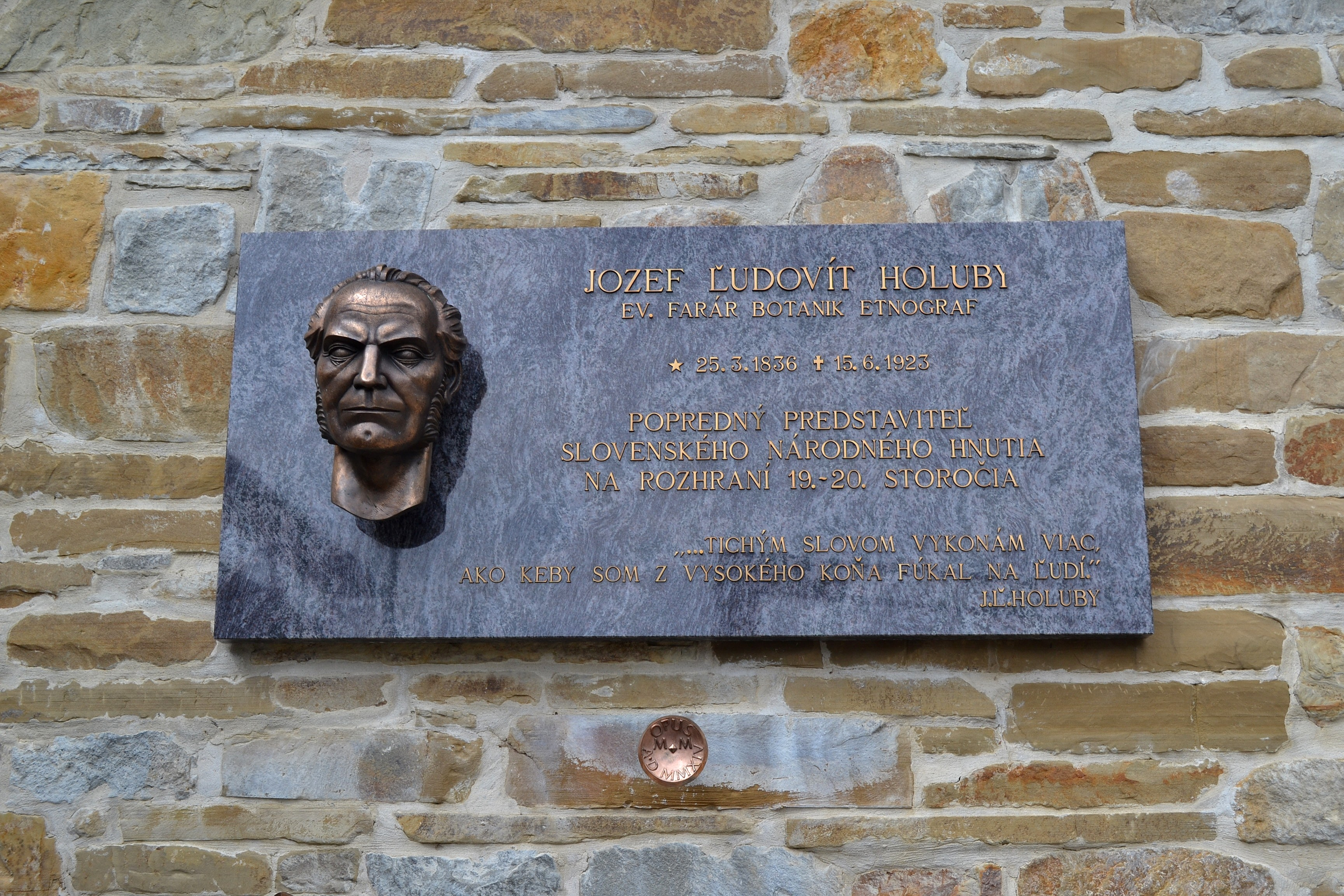 Pamätná tabuľa na múre Holubyho chaty venovaná tejto významnej slovenskej osobnosti